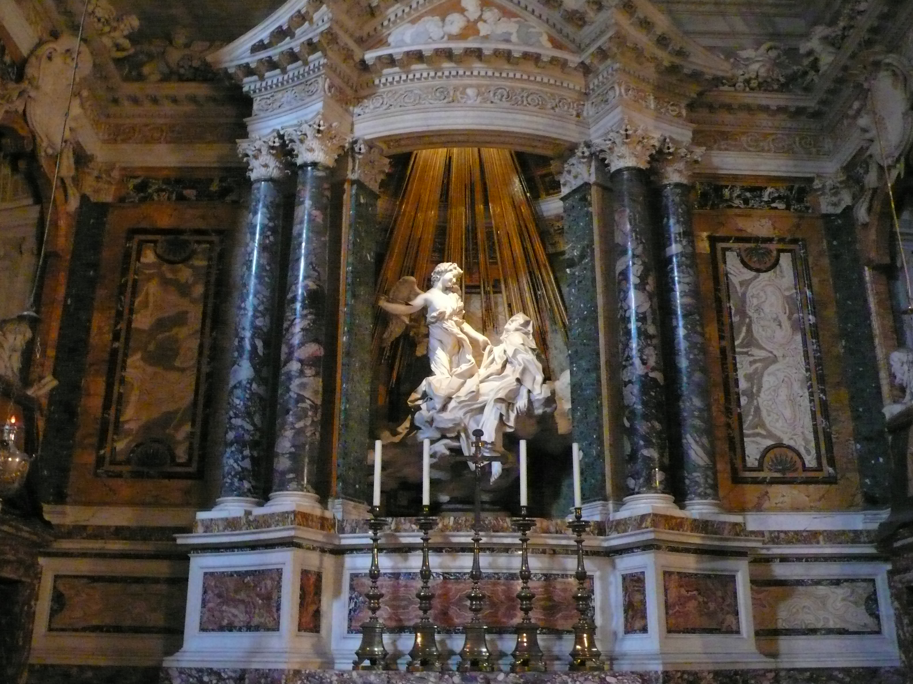 Die Verzückung der Hl. Teresa von Avila, Bernini, Santa Maria della Vittoria, Rom